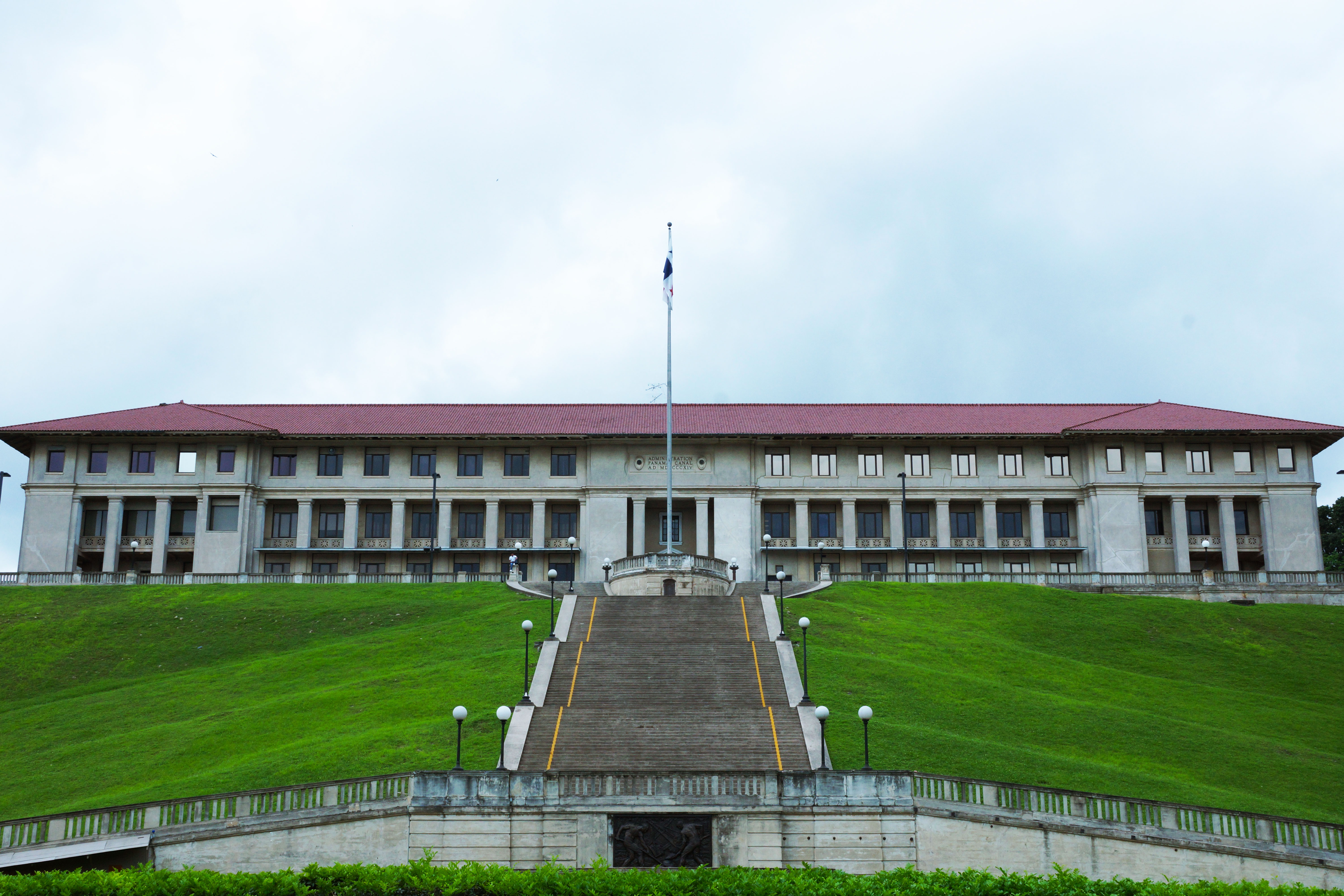 El ingeniero jefe George W. Goethals en 1912 sugirió la construcción de un edificio más grande para la sede administrativa de la Comisión del Canal. Como arquitecto se nombró a Austin W. Lord quien terminó los planos en 1913. Por medio del Tratado celebrado por Omar Torrijos Herrera y Jimy Carter, celebrado el 7 de septiembre de 1977, que entró en vigencia el 1 de octubre de 1979,se revierte a Panamá el 31 de diciembre de 1999, la administración del Canal de Panamá. Para hacerle frente a esta nueva responsabilidad, “mediante Acto Legislativo, ha adicionado un nuevo título (XV) a la operación de la vía acuática y crea la Autoridad Del Canal”, que remplaza a la antigua Comisión Del Canal. Desde el año 2000, todo lo concerniente a la administración, funcionamiento, mantenimiento conservación, modernización y actualmente la ampliación, del Canal de Panamá, le corresponden a la Autoridad Del Canal de Panamá.